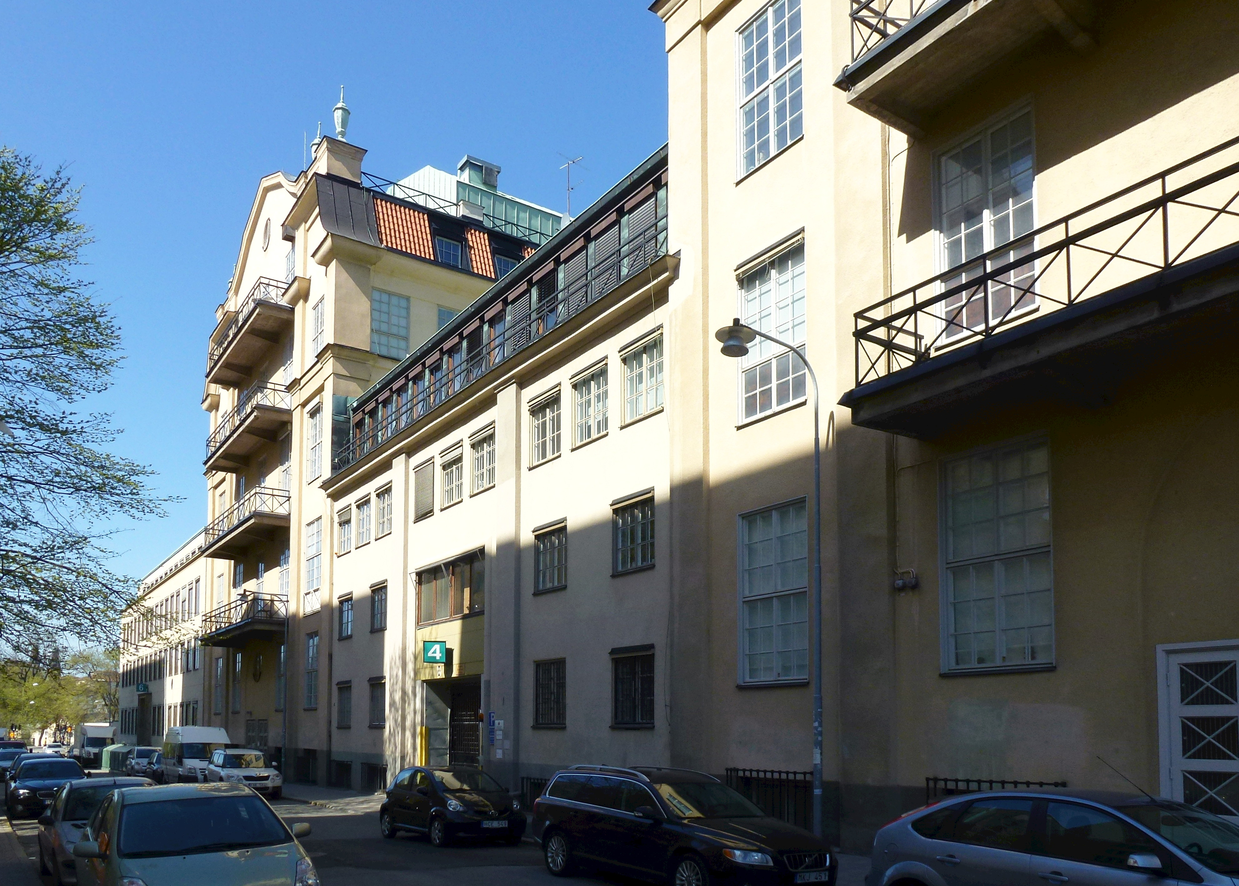 Tobaksmonopolets gamla byggnad